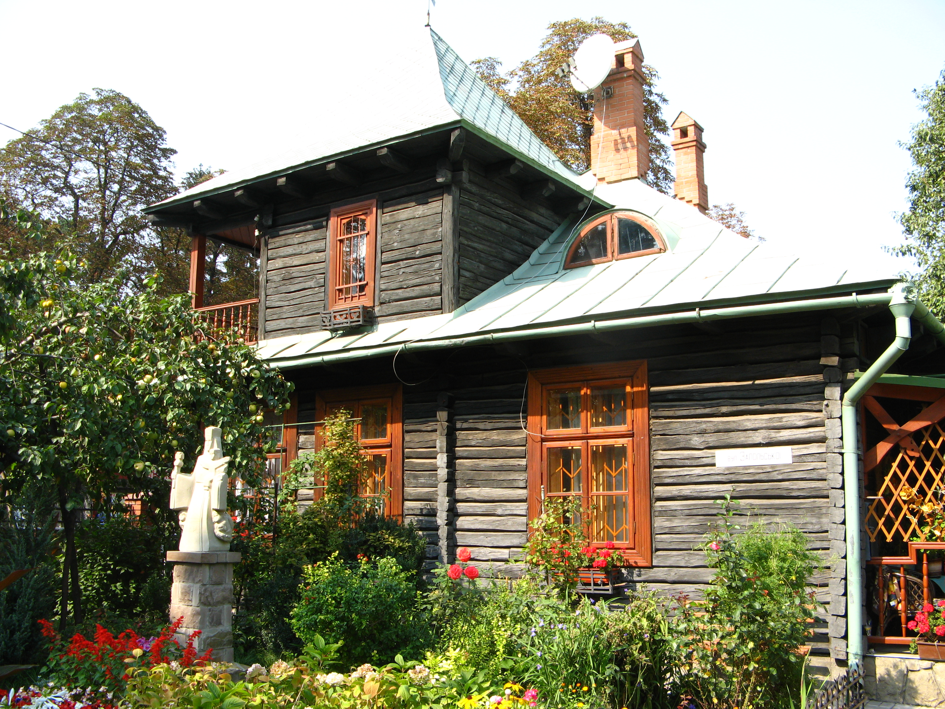 Ялівець_(Львів)-2.JPG: район Ялівець_(Львів)